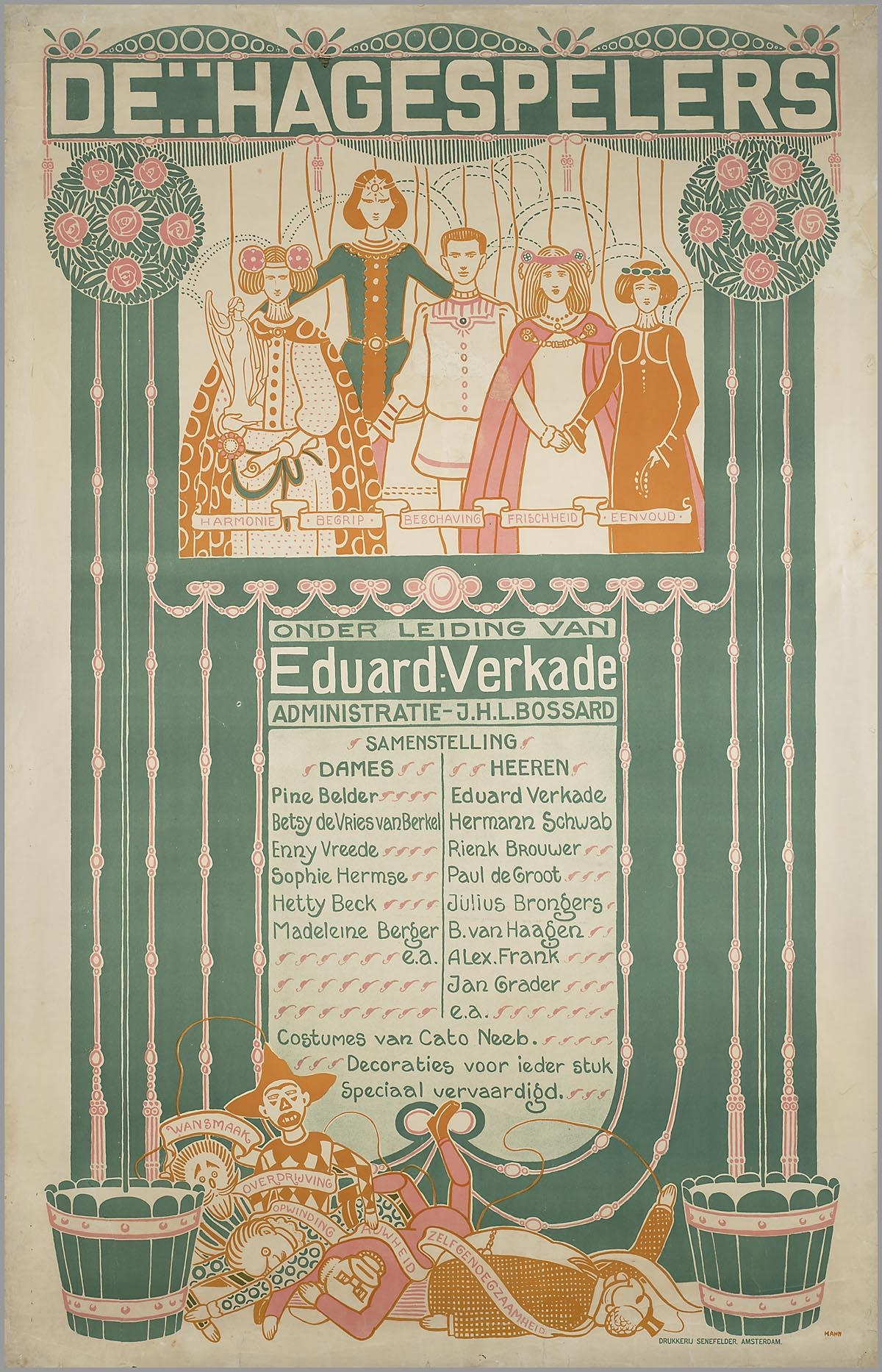 Affiche. "De Hagespelers onder leiding van Eduard Verkade".